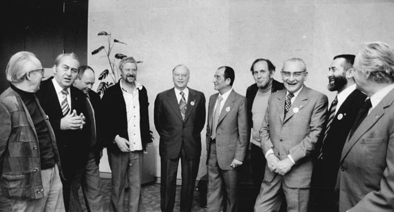 ADN-ZB-Senft-21.11.1978-Berlin: VIII. Kongreß des Verbandes Bildender Künstler der DDR. Gesprächsgruppe in einer Kongreßpause. V.l.n.r.: Herbert Sandberg, Grafiker, Konrad Naumann, Mitglied des Politbüros des ZK der SED und 1. Sekretär der Bezirksleitung Berlin, Walter Womacka, Maler, Jo Jastram, Bildhauer, Kurt Hager, Mitglied des Politbüros und Sekretär des ZK der SED, Willi Sitte, Maler, Bernhard Heisig, Maler, Paul Verner, Mitglied des Politbüros und Sekretär des ZK der SED, Clauss Dietel, Klaus Wittkugel, Grafiker.